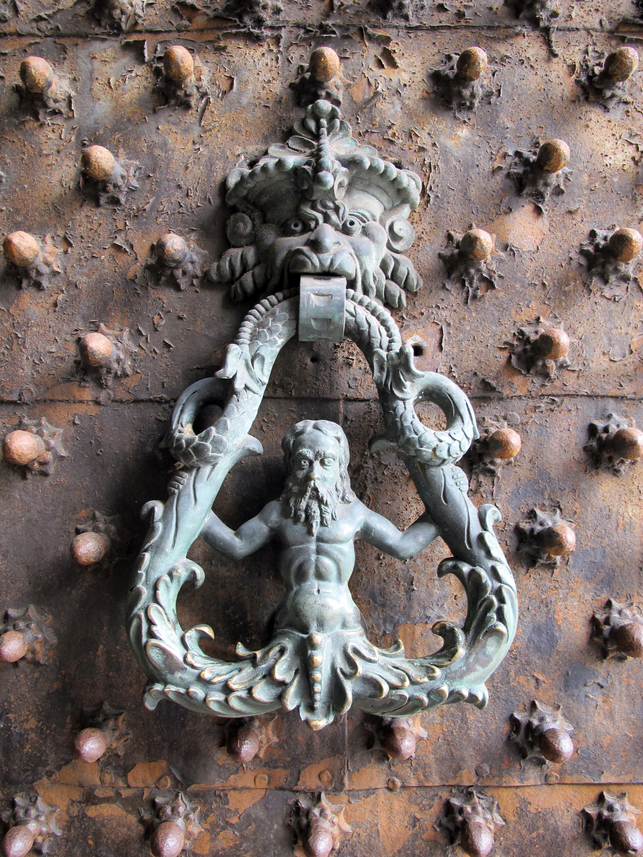 Genova, Liguria